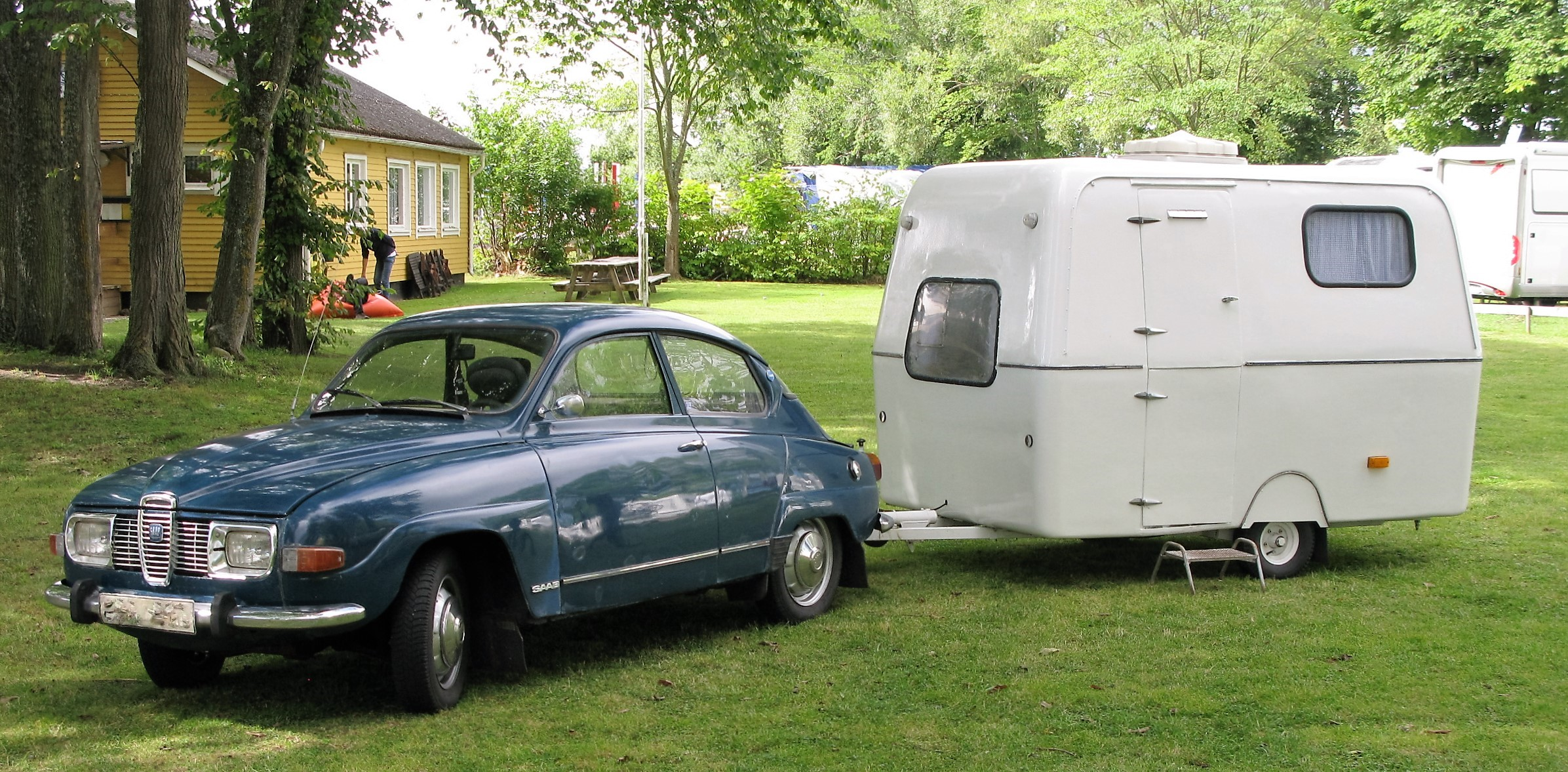 International Saab Meeting 2016.